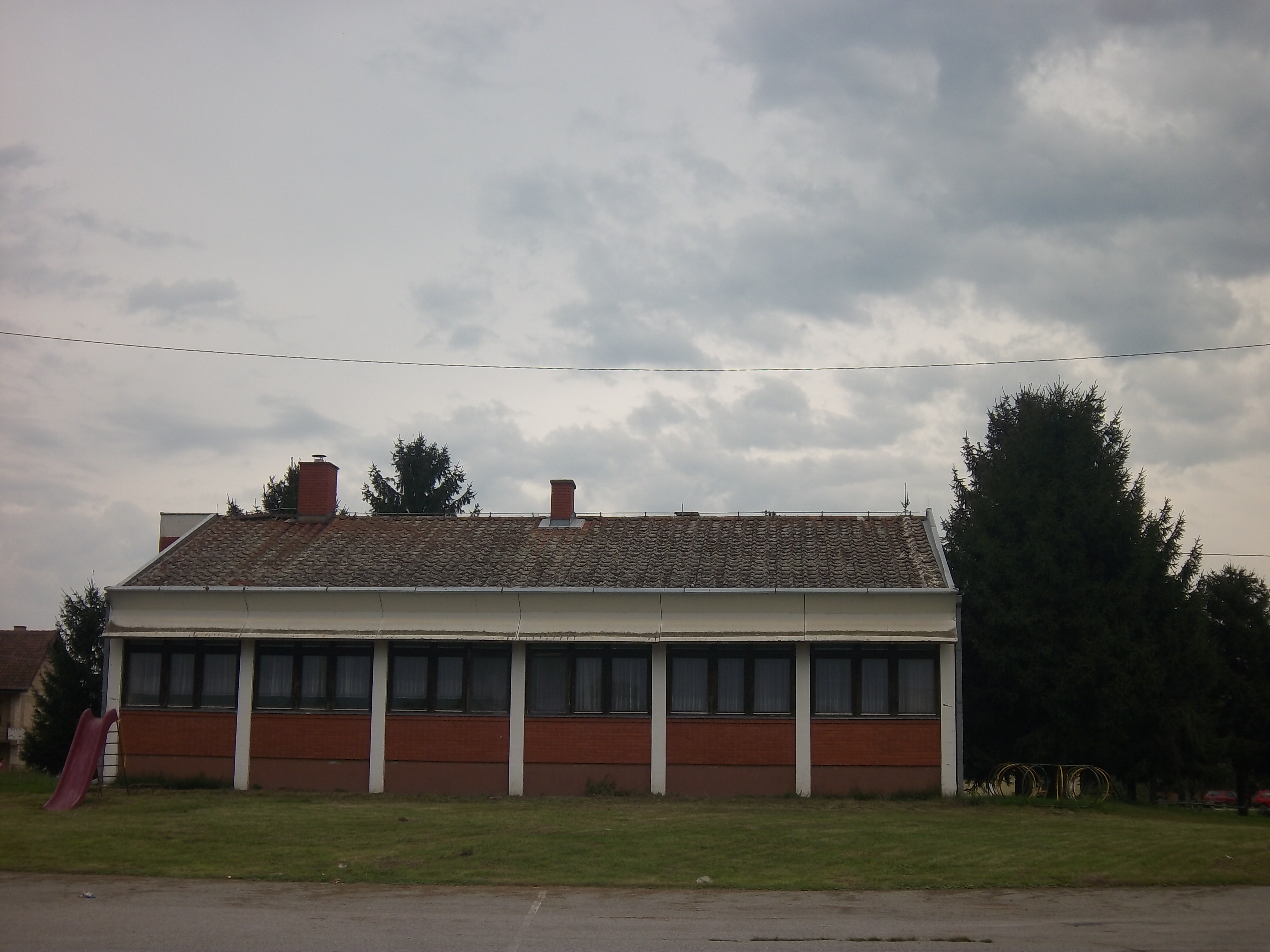 Српски (ћирилица): Насеље Вера у Општини Трпиња у источној Хрватској.